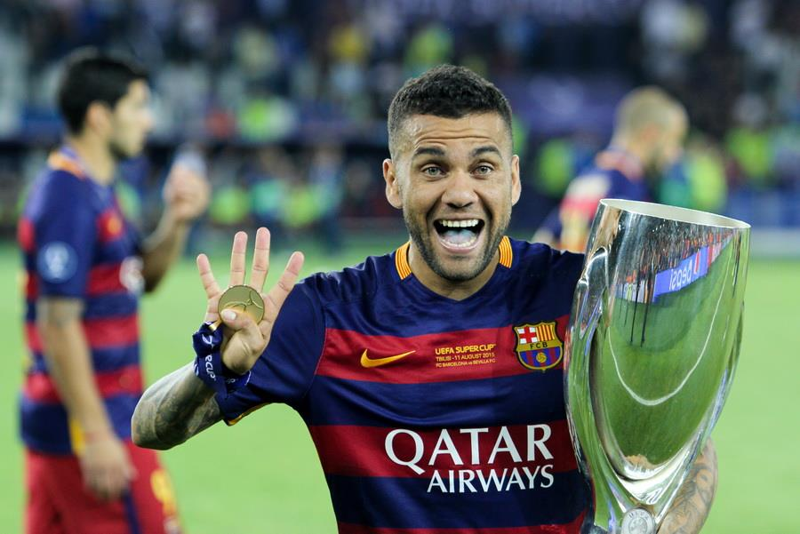 Нагородження переможців матчу за Суперкубок УЄФА 2015 року у Тбілісі. Грузія